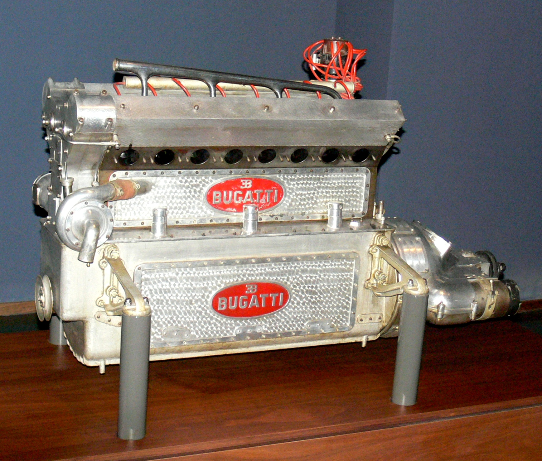 Bugatti Motor 50B von 1938 im im Musée National de l'Automobile (Muhlhouse); 8 Zyl., 4741 ccm, 400 PS bei 5100 U/min